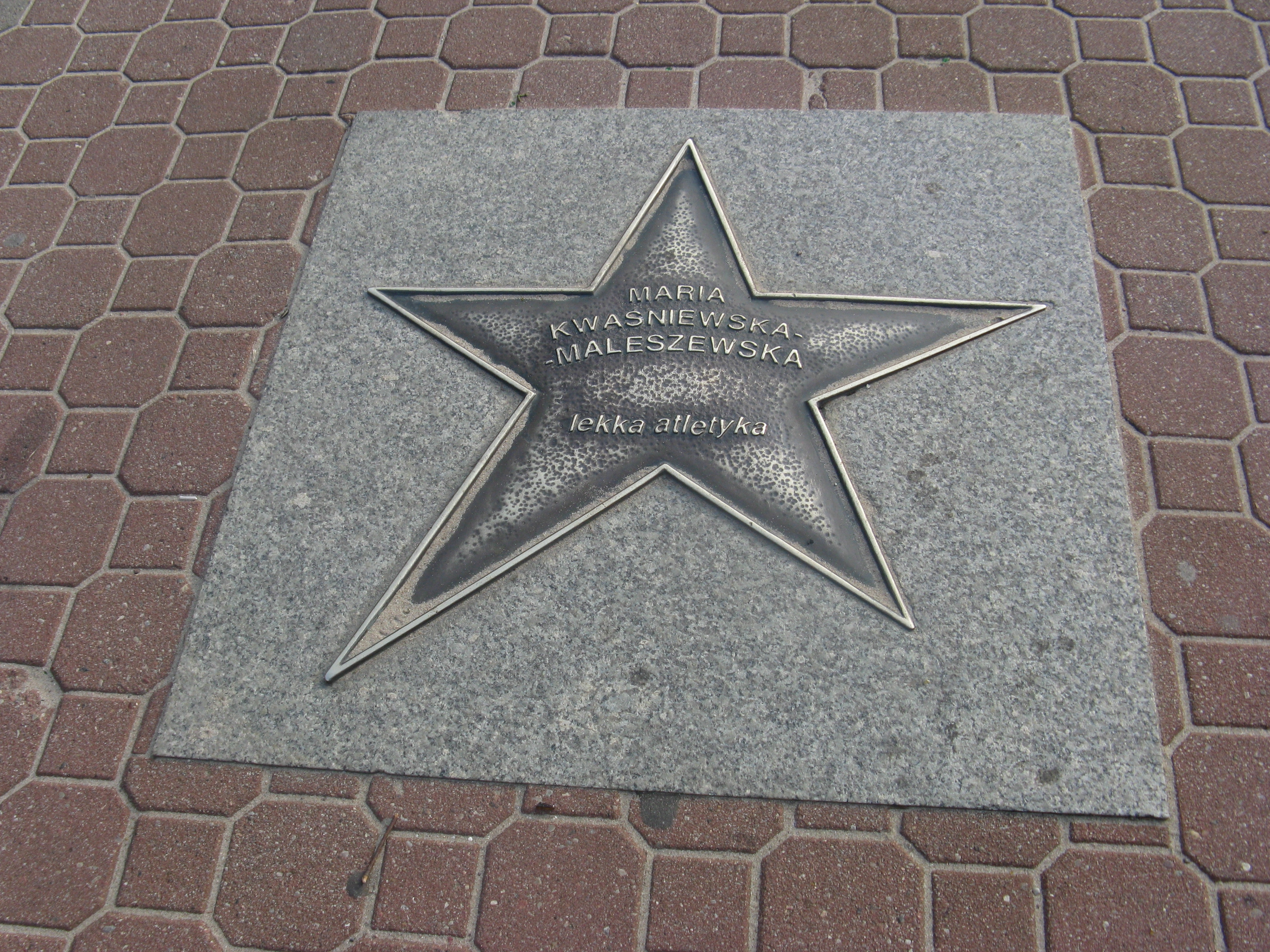 Gwiazda w Alei Gwiazd sportu we Władysławowie